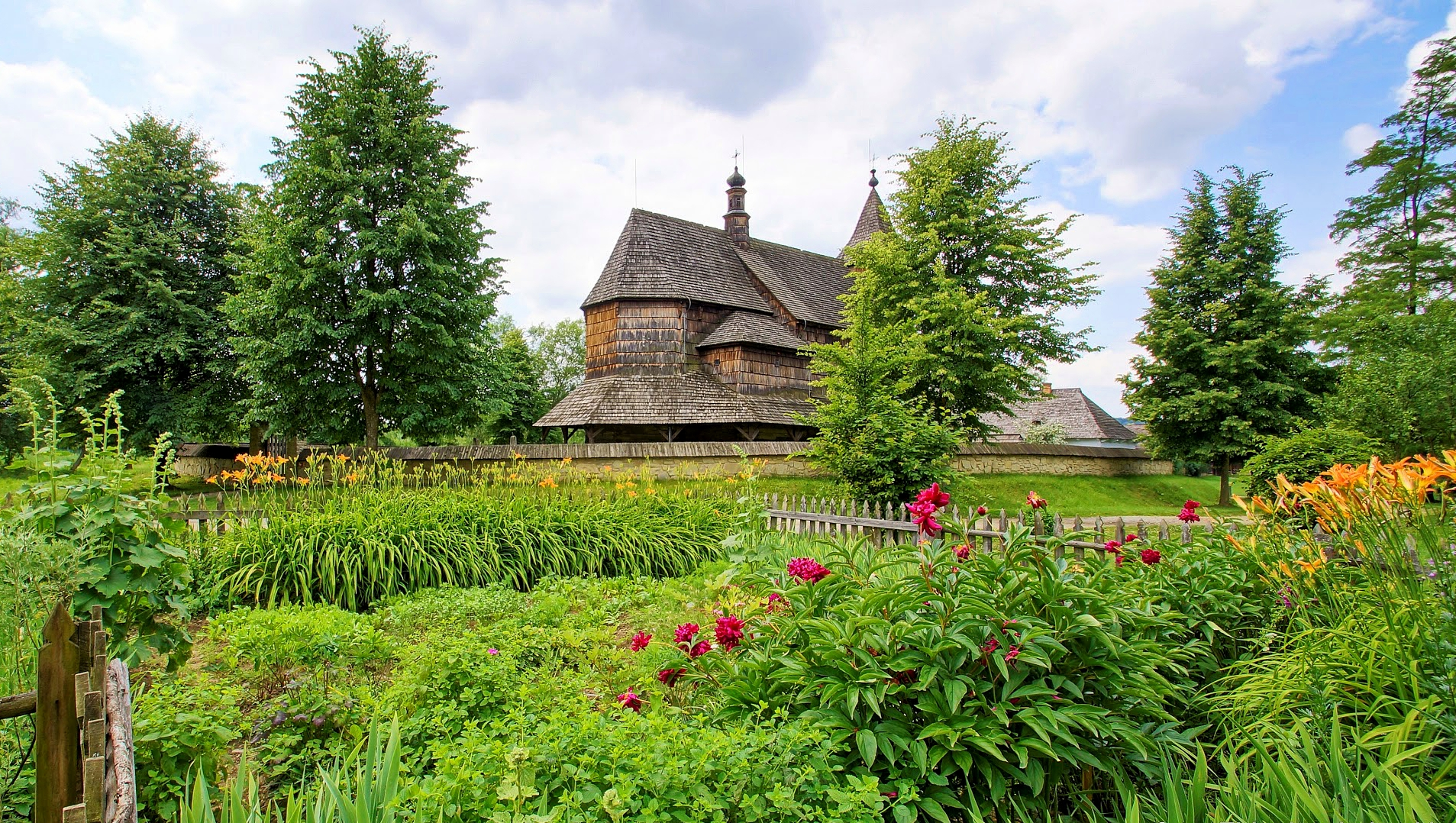 Kościół z Bączala Dolnego, obecnie w Muzeum Budownictwa Ludowego w Sanoku.